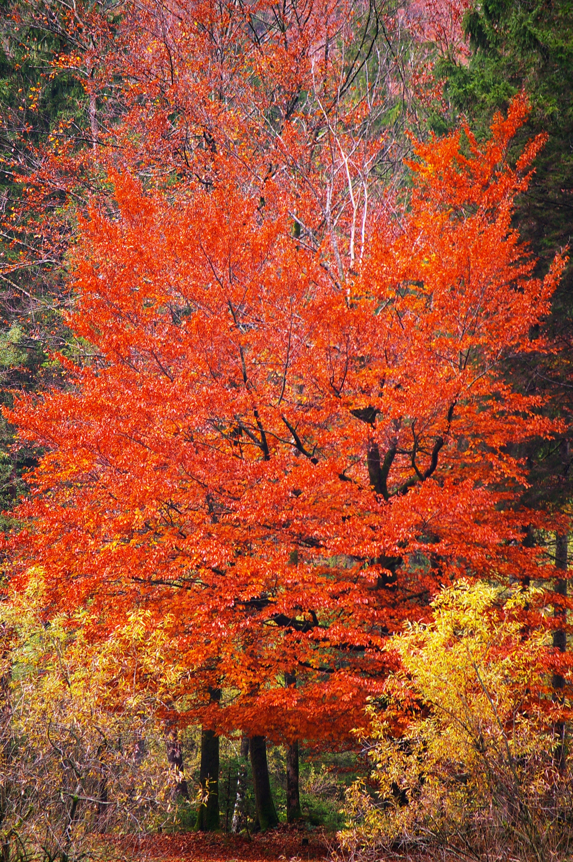 Bluntautal bei Golling (Tennengau-Salzburg)